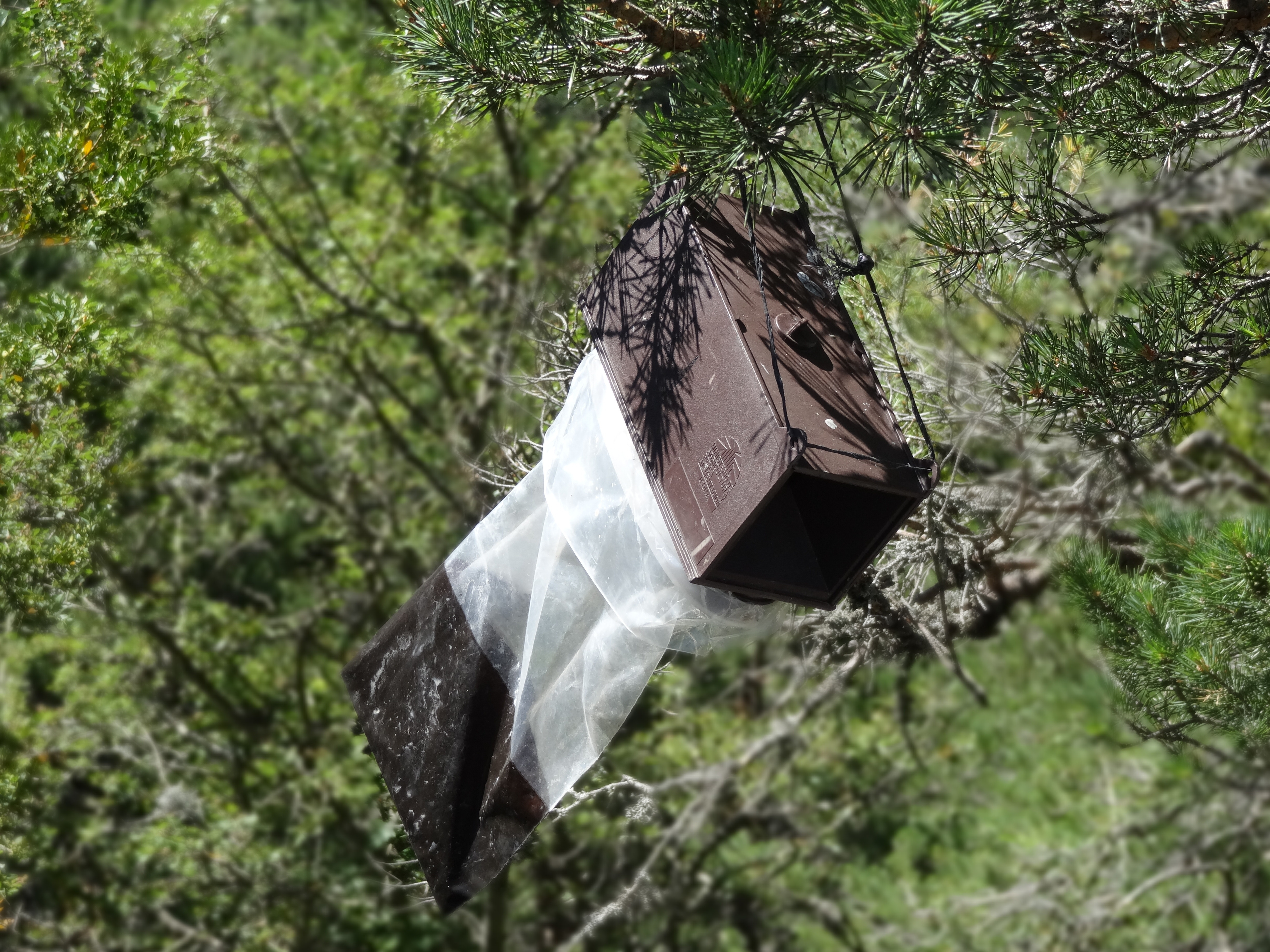 Trampa con la feromona sintética para procesionaria del pino (Thaumetopoea pityocampa), Navarra.